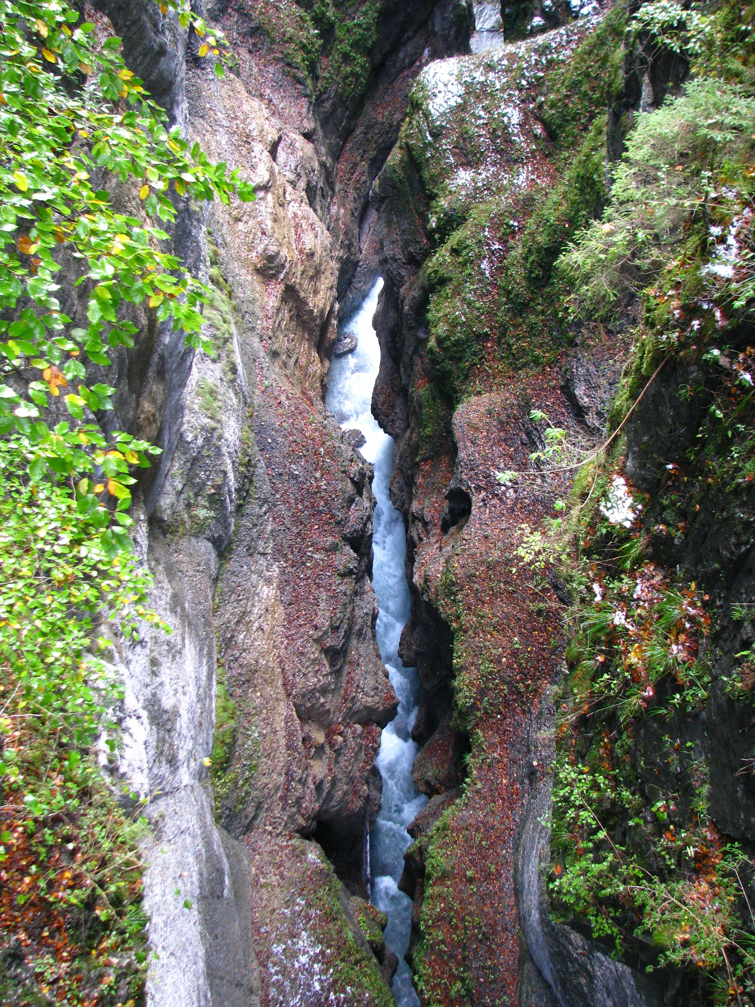 Blick vom Eisernen Stieg zwischen Partnachalm und Graseck in die etwa 80 m tiefe Partnachklamm.